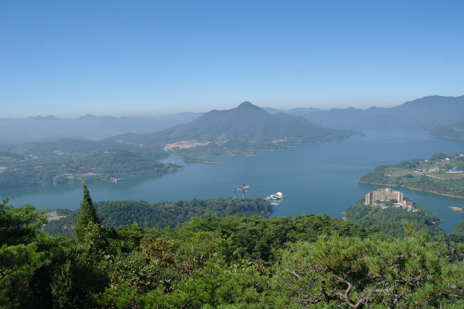 청풍명월의 본향 청풍유역과 청풍호의 전경